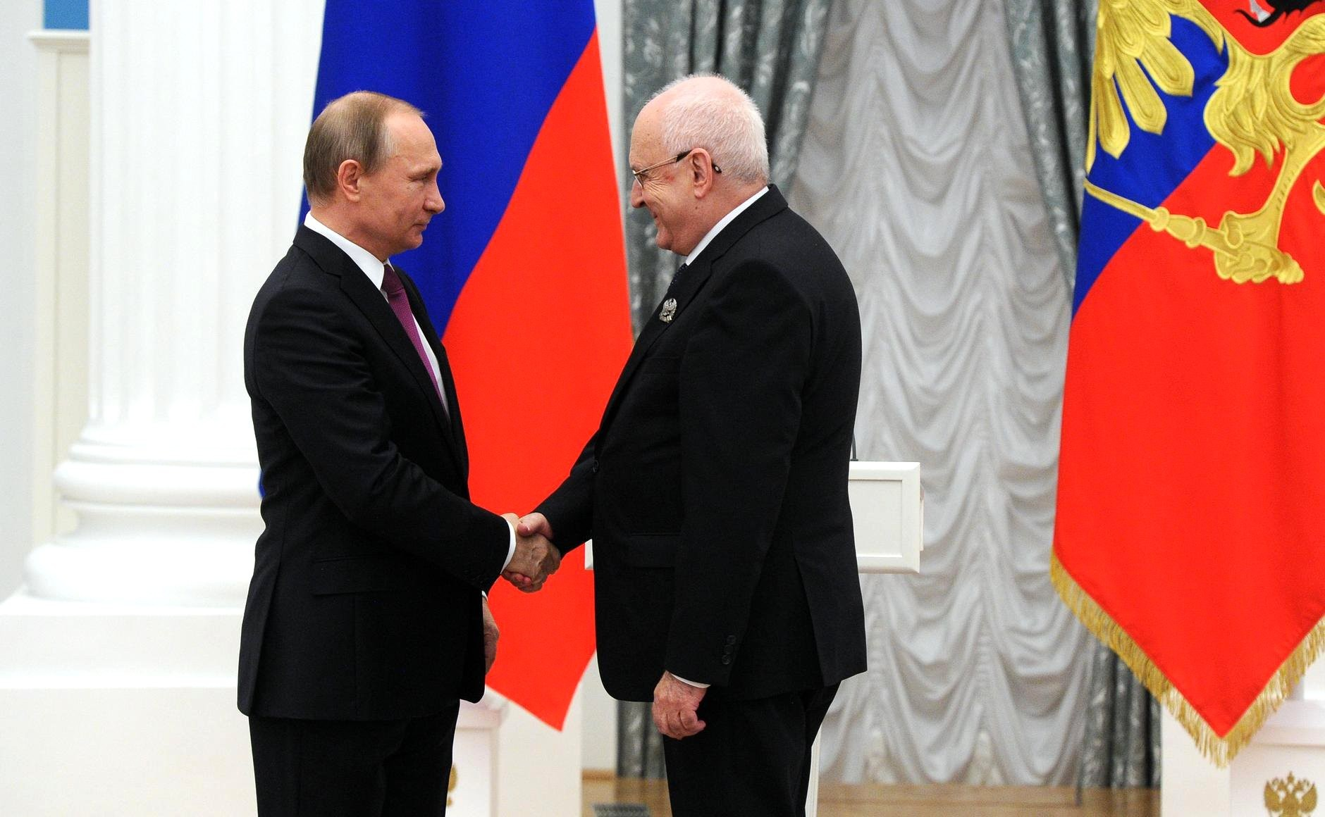 Вручение премий Президента молодым деятелям культуры и премий за произведения для детей и юношества. Премии Президента в области литературы и искусства за произведения для детей и юношества 2015 года удостоен режиссёр, художественный руководитель Российского государственного академического молодёжного театра Алексей Бородин